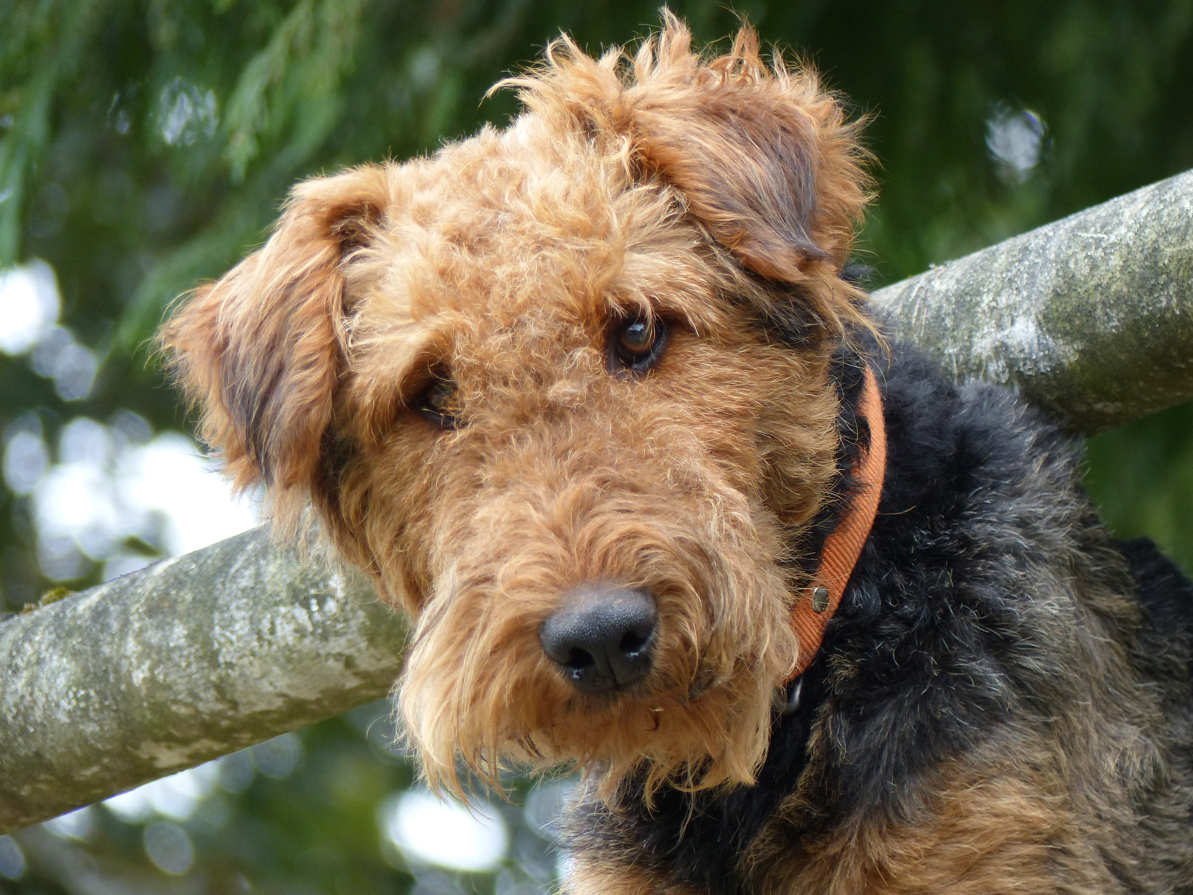 Tête d'un chien de race Airedale Terrier à Josselin, Bretagne, France